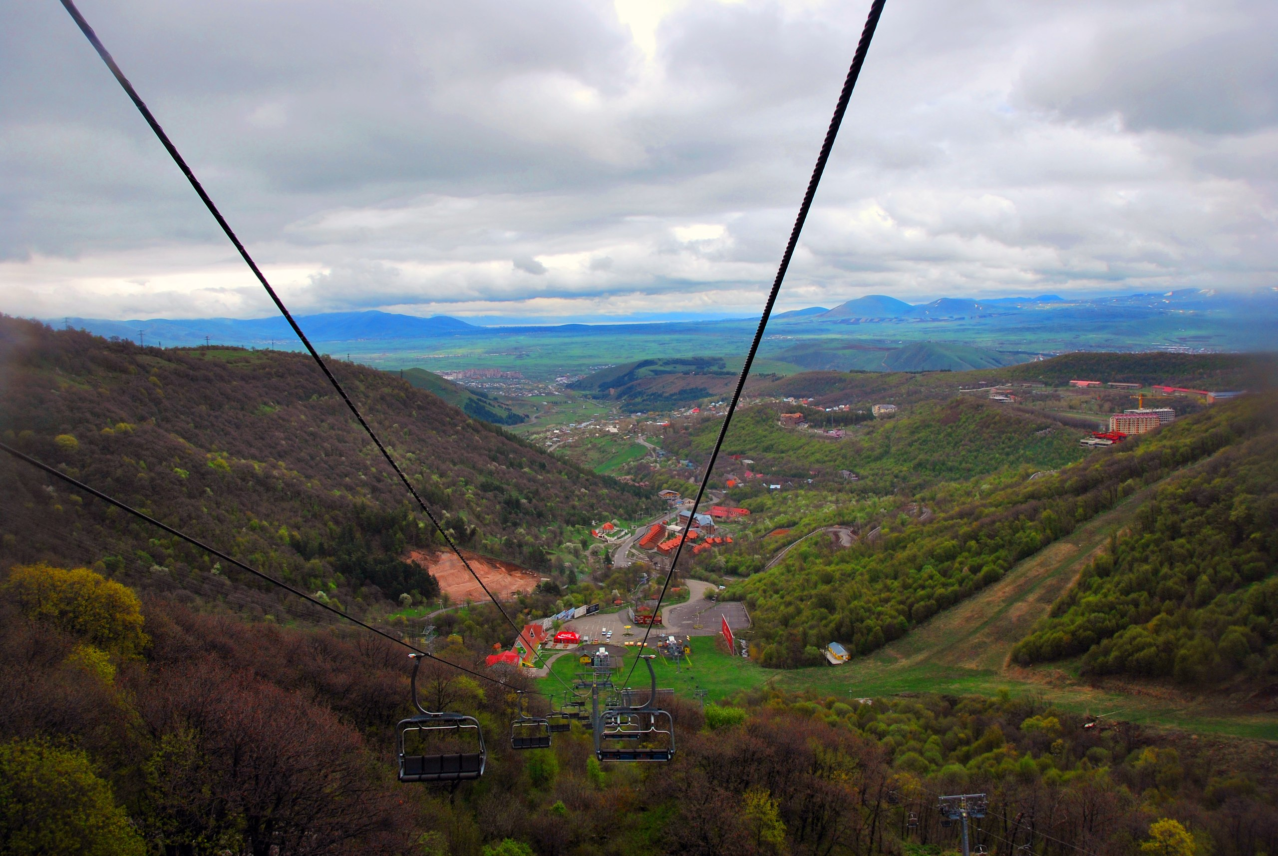 Цахкадзорская канатная дорога